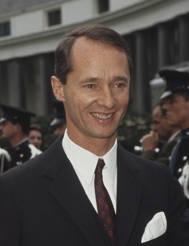 Koninginnedag, in tuin Paleis Soestdijk ; Prinses Irene met Prins Hughes Charles